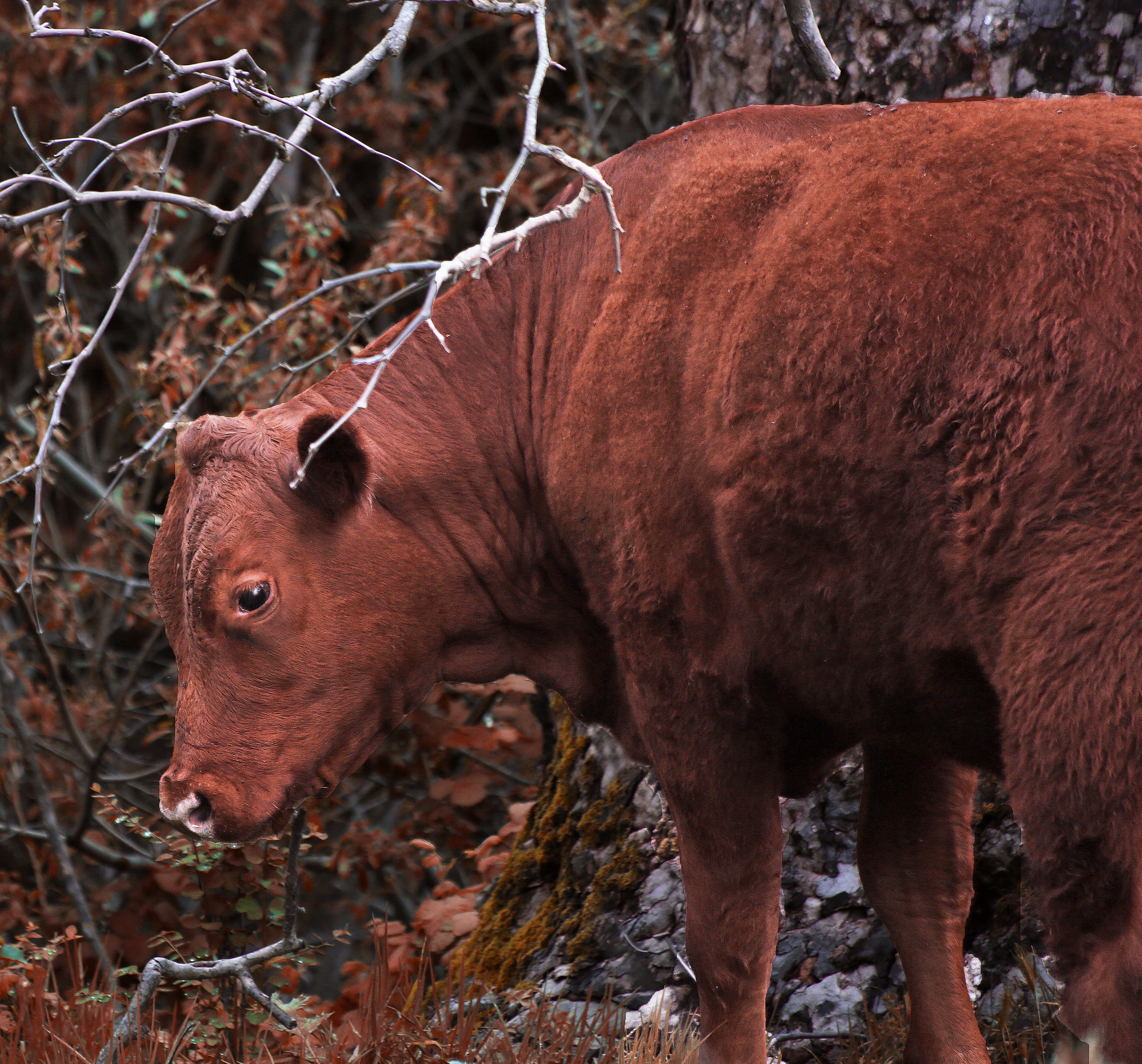 Red Heifer